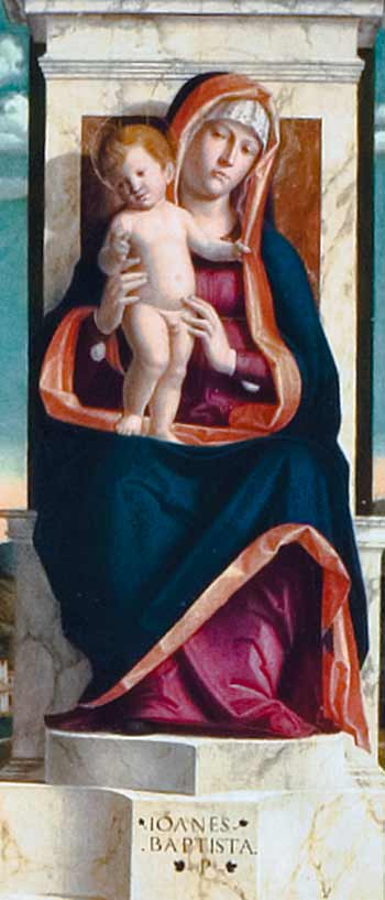 Miglionico - Madonna con bambino - Tavola centrale del Polittico di Cima da Conegliano custodito all'interno della Chiesa Madre